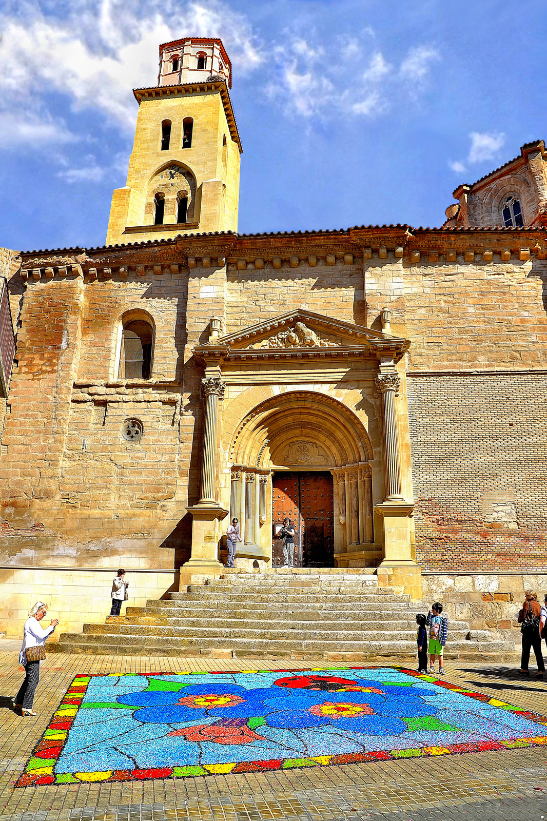 Ex-Colegiata de Santa Maria la Mayor